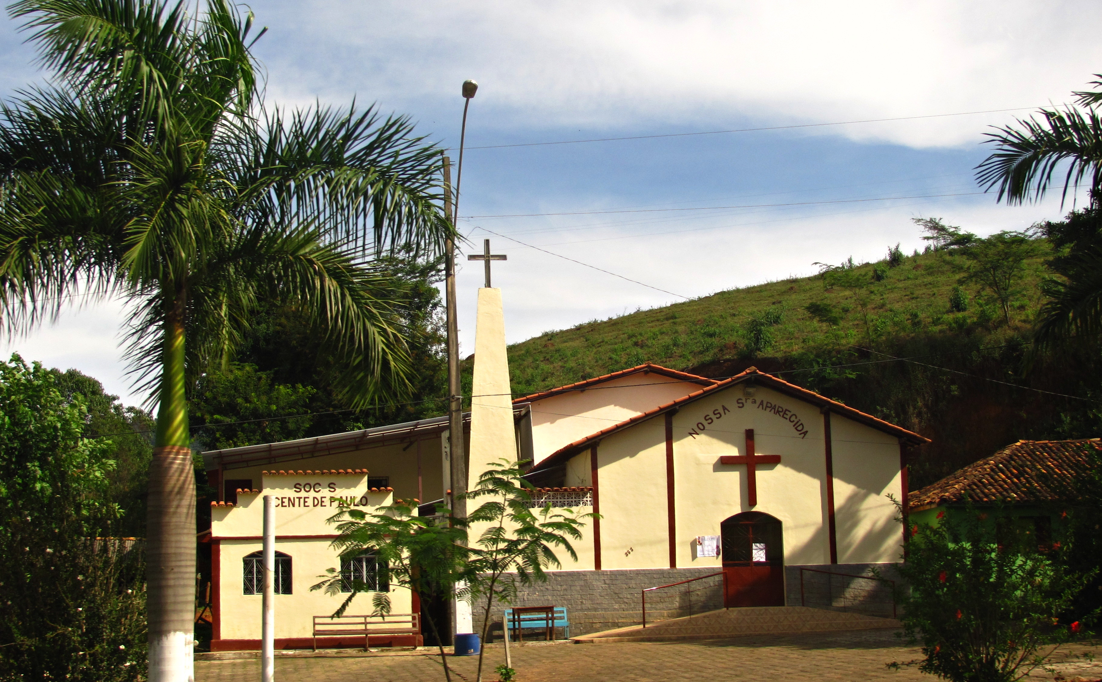 Igreja de Nossa Senhora Aparecida na entrada de Orizânia